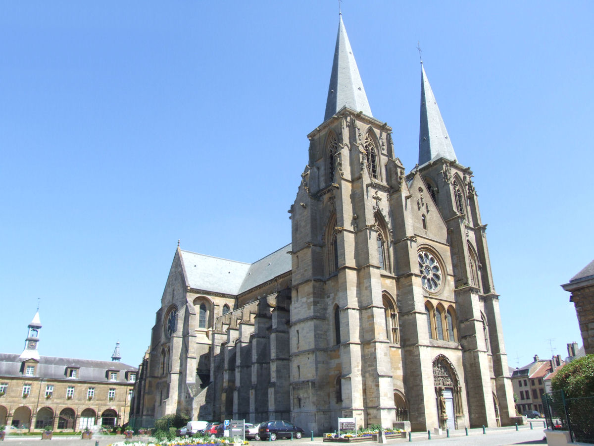 Eglise Notre-Dame de Mouzon, Mouzon, Ardenne, France